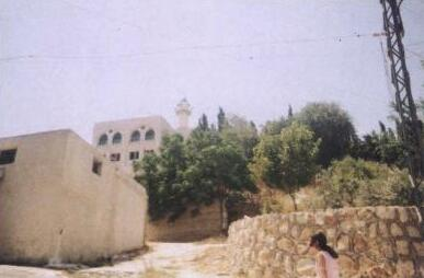 الجامع المنسوب لأبي ذر الغفاري في بلدة ميس الجبل في جبل عامل (جنوب لبنان)